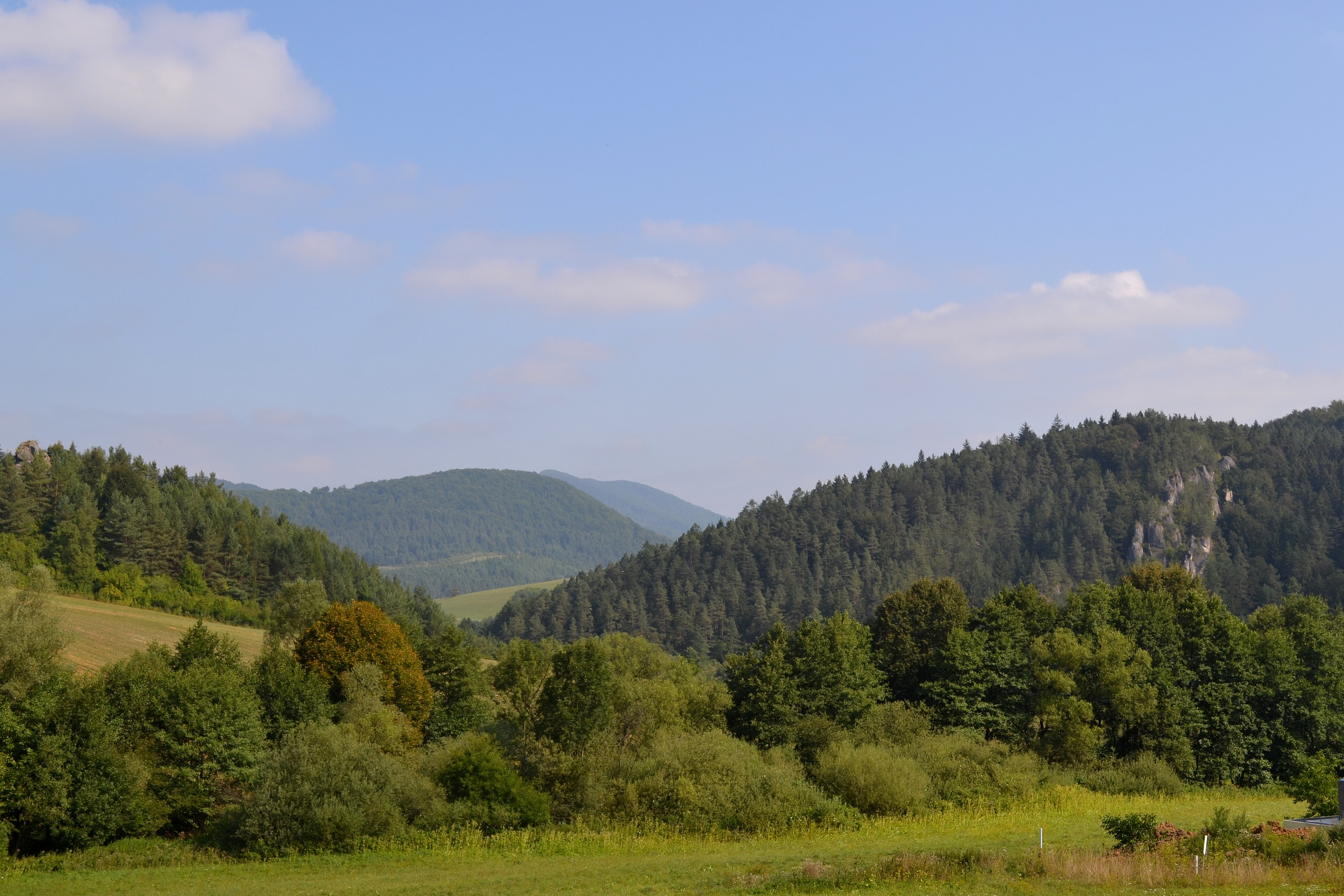 Počarová (okr. Považská Bystrica), obec leží priamo v CHKO Strážovské vrchy; pohľad na hory severovýchodne od obce